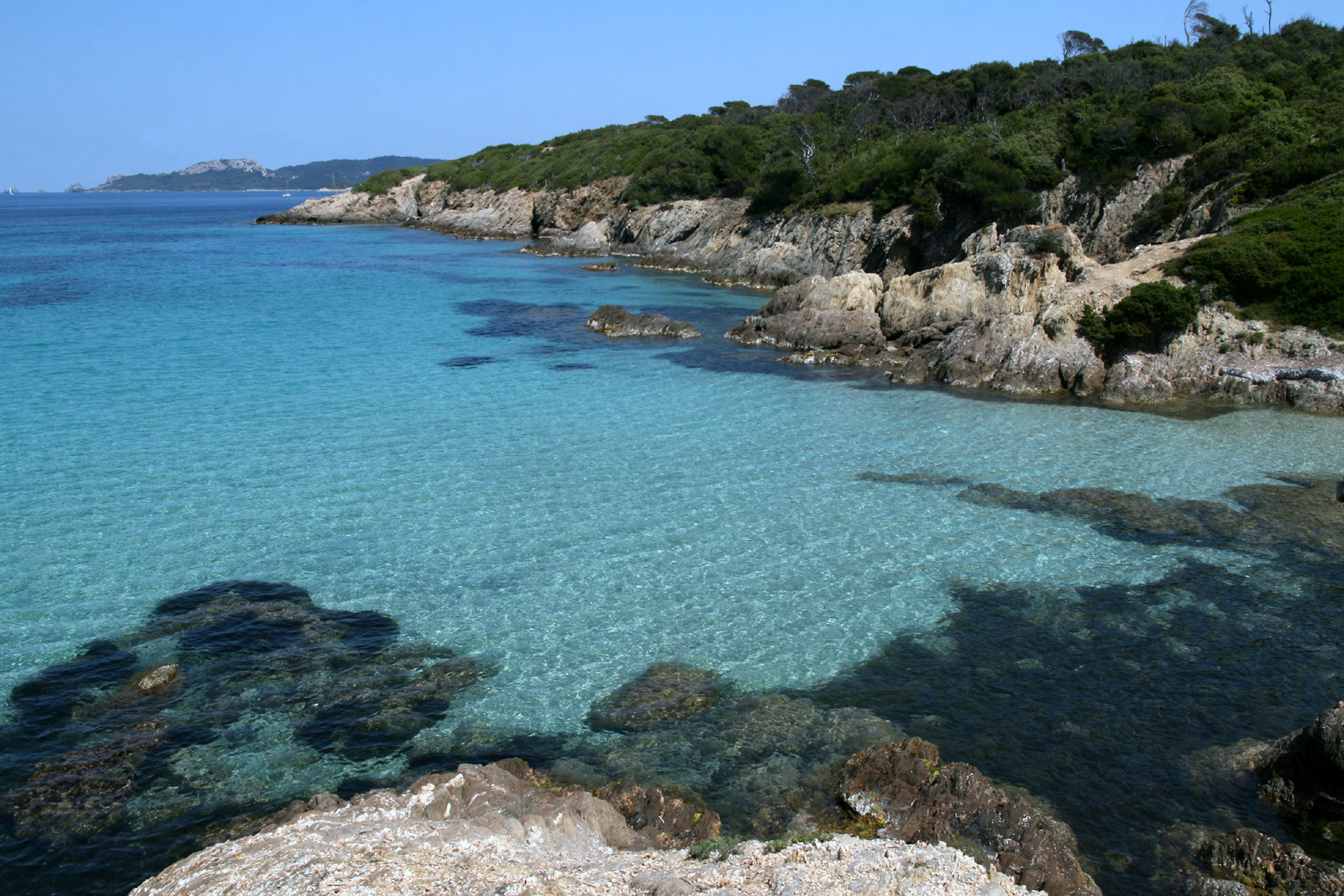 Cote interieure de Porquerolles